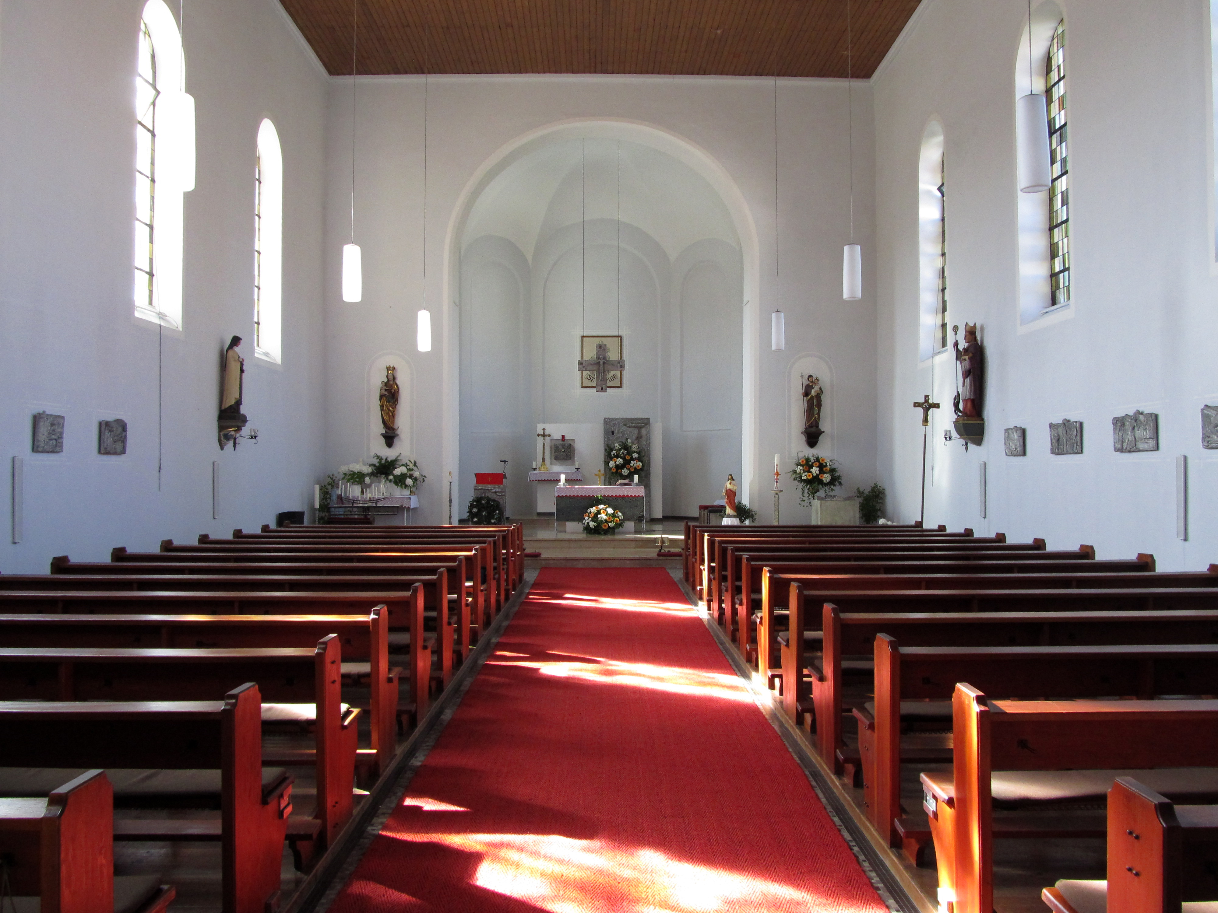 Blick ins Innere der katholischen Pfarrkirche St. Pirminius in Walsheim, einem Ortsteil der Gemeinde Gersheim, Saarland